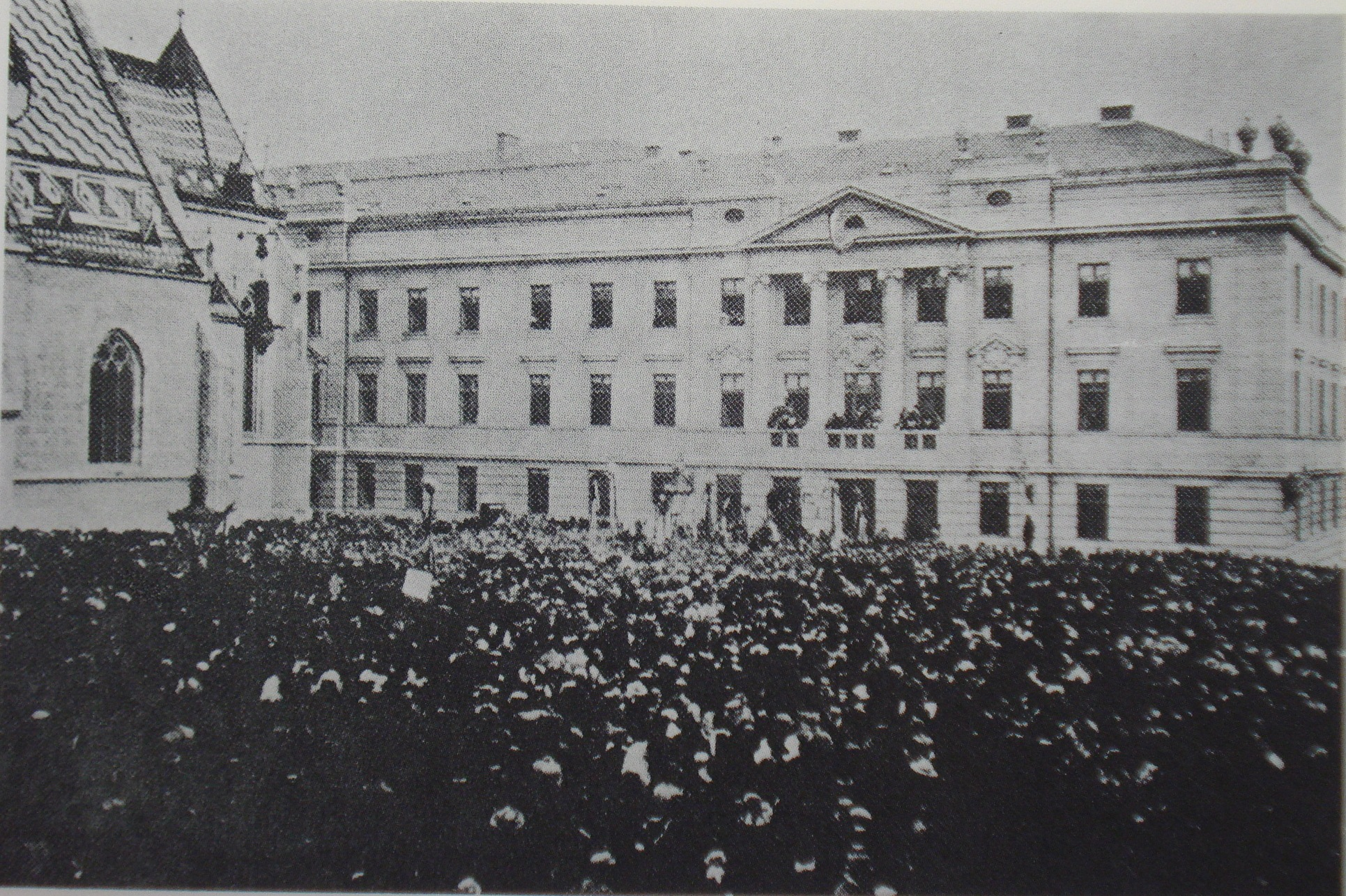 Objava o raskidu veza s Austrijom i Ugarskom, Trg sv. Marka, 29.10.1918.